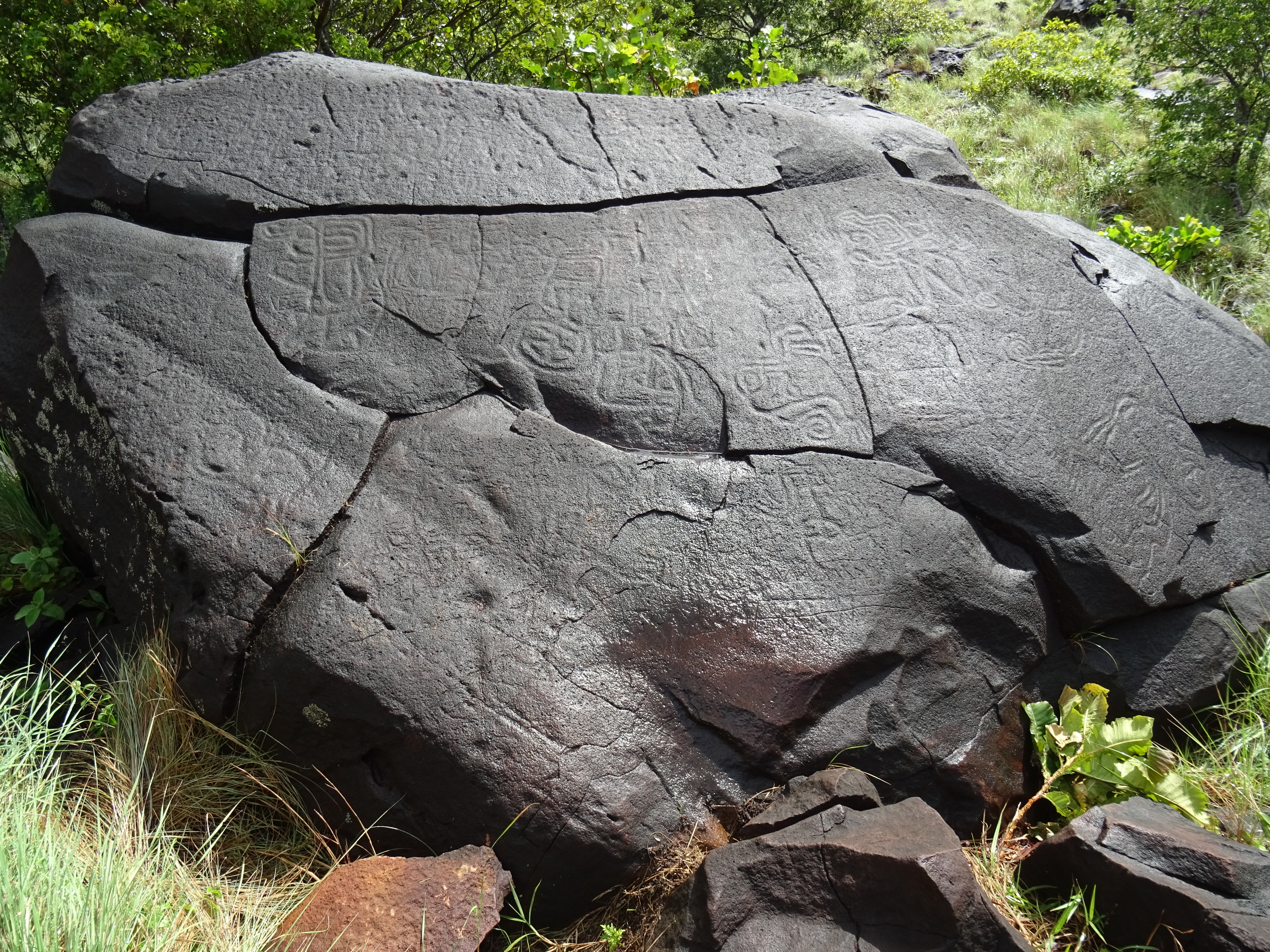 Rock art in the Pedregal